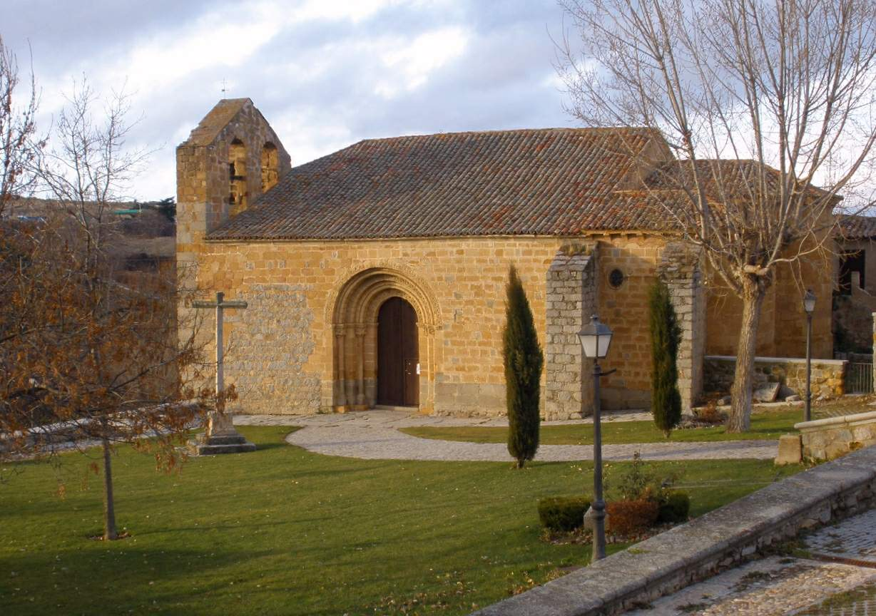 Hermitage of San Segundo, Ávila